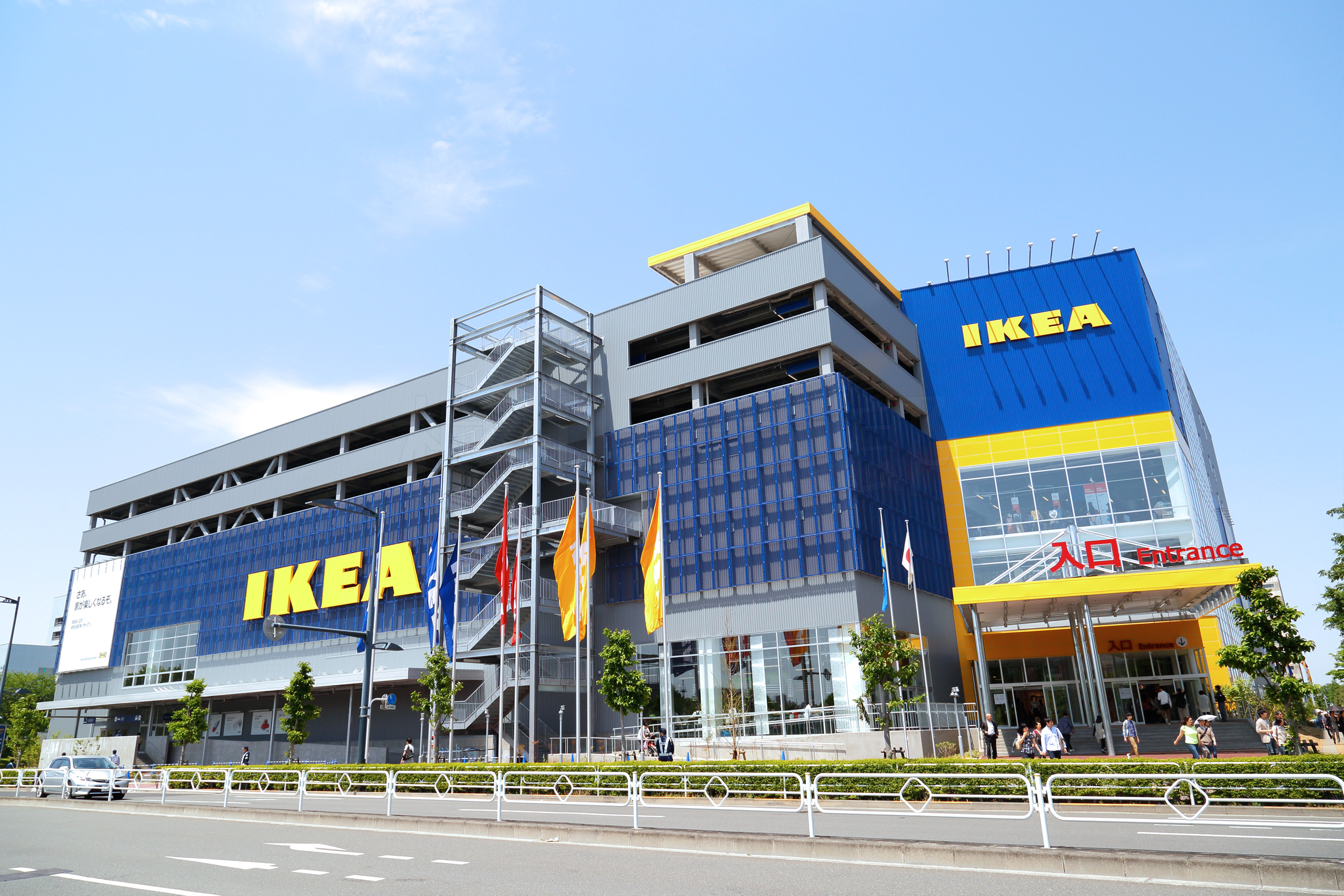 イケア立川。